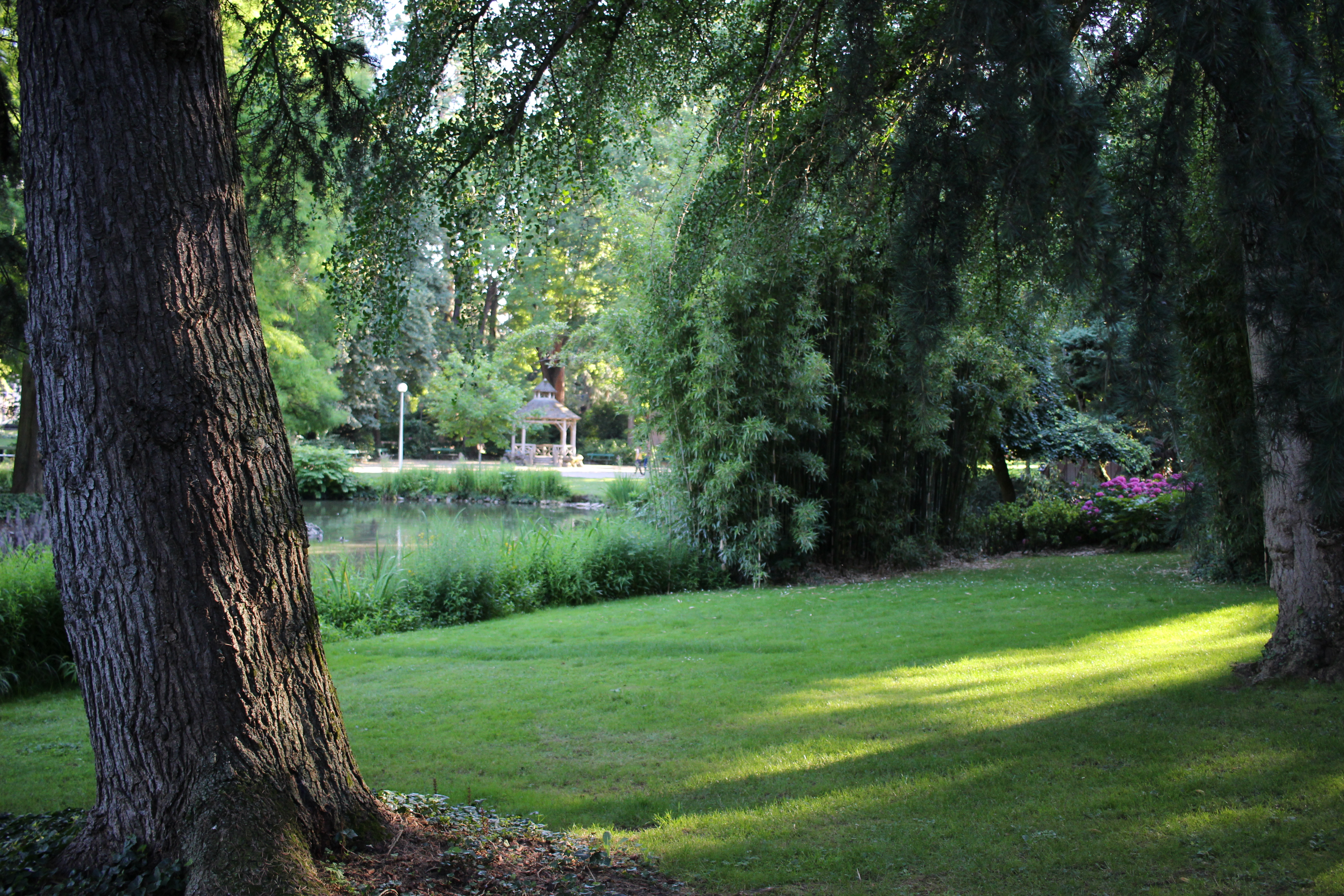 vue dans le jardin des Prébendes de Tours.